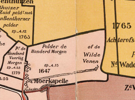 Wilde Venen